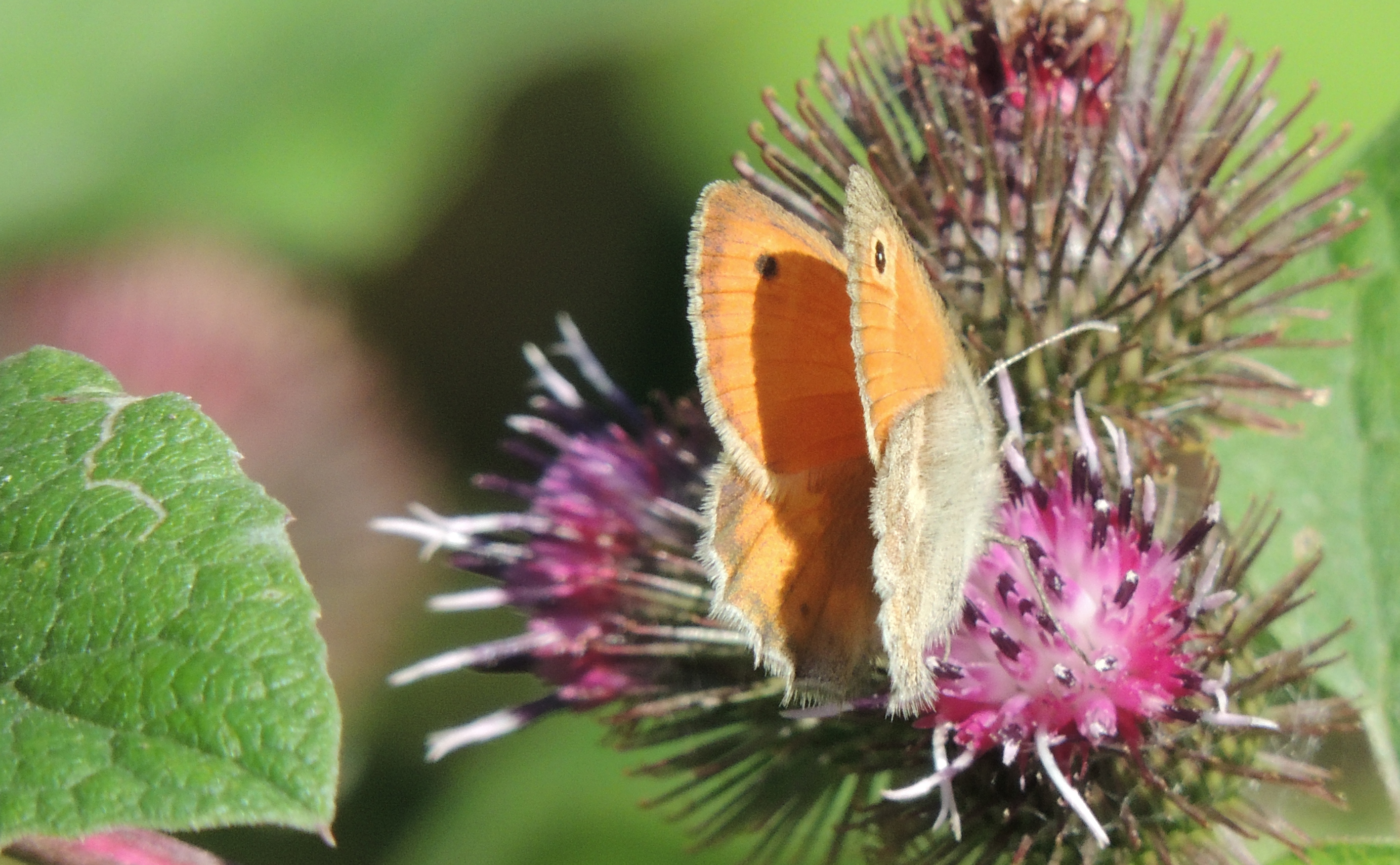 Hooibeestje of Coenonympha pamphilus, zicht op de binnenzijde van de vleugels, die normalerwijze steeds gesloten zijn.